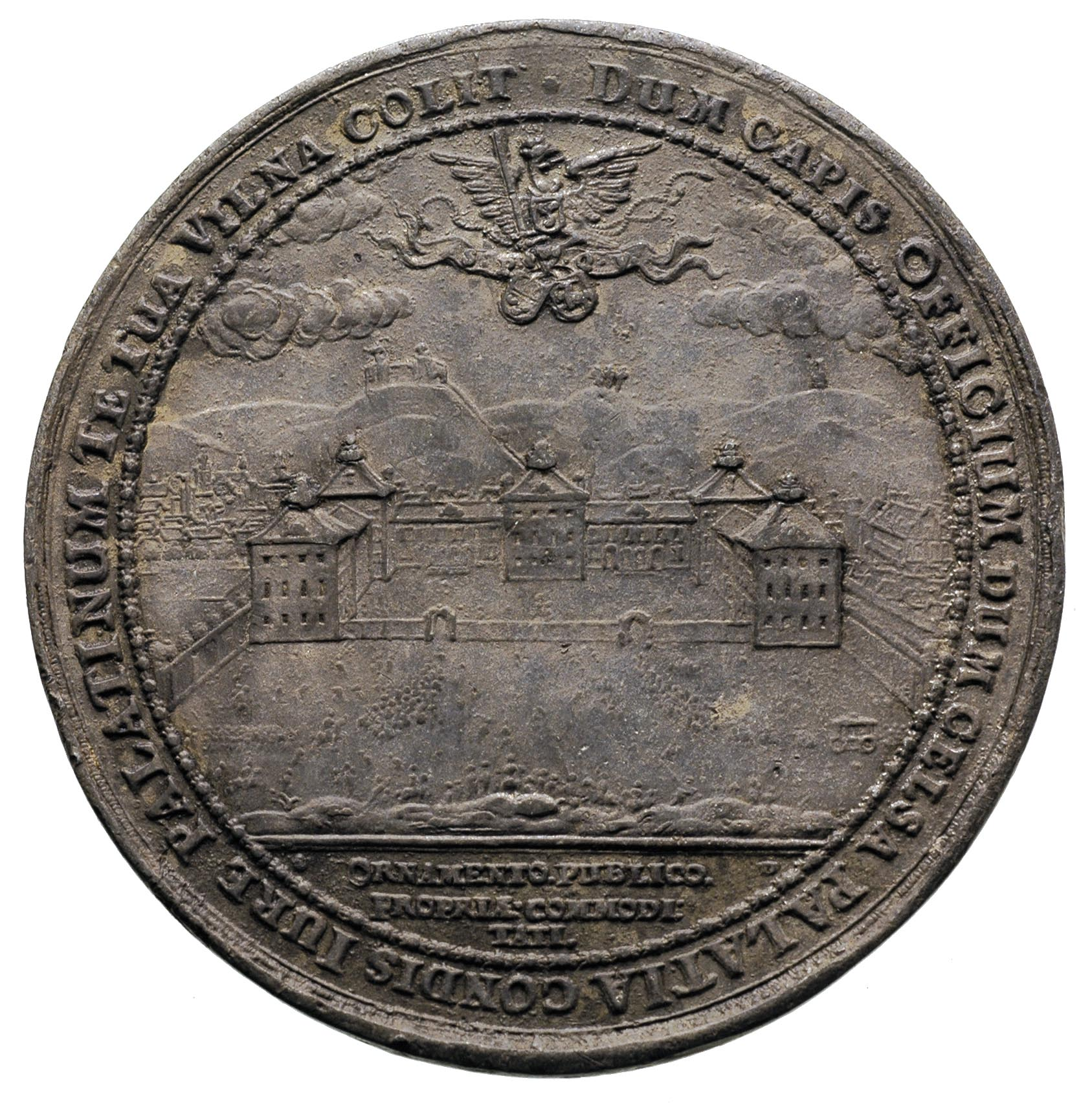 Sebastiano Dadlerio medalis (1653 m.), reversas - Radvilų rūmai Vilniuje